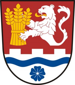 Hořenice